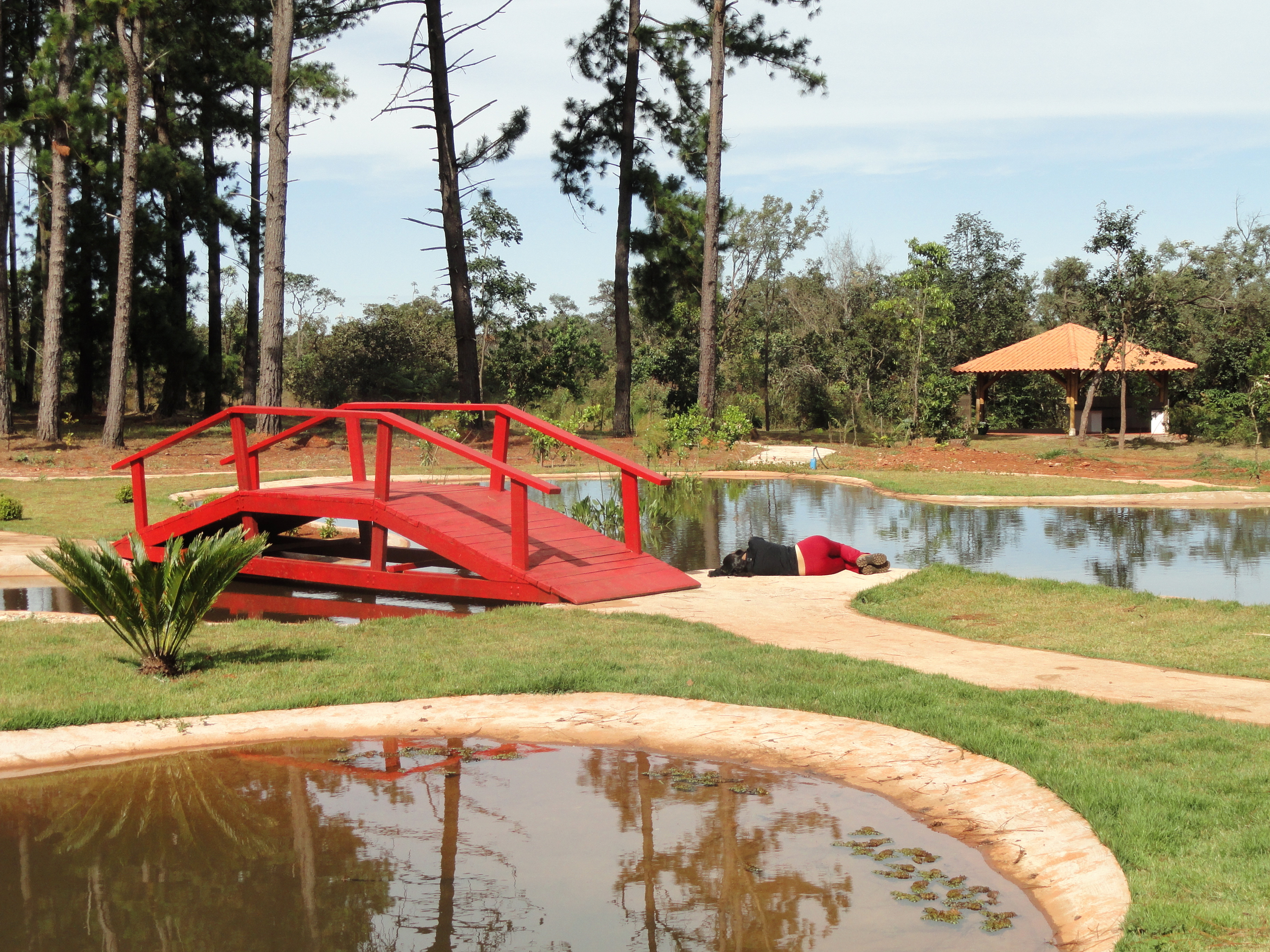 Japanese garden in the Jardim Botânico de Brasília, Brasília, Brazil.